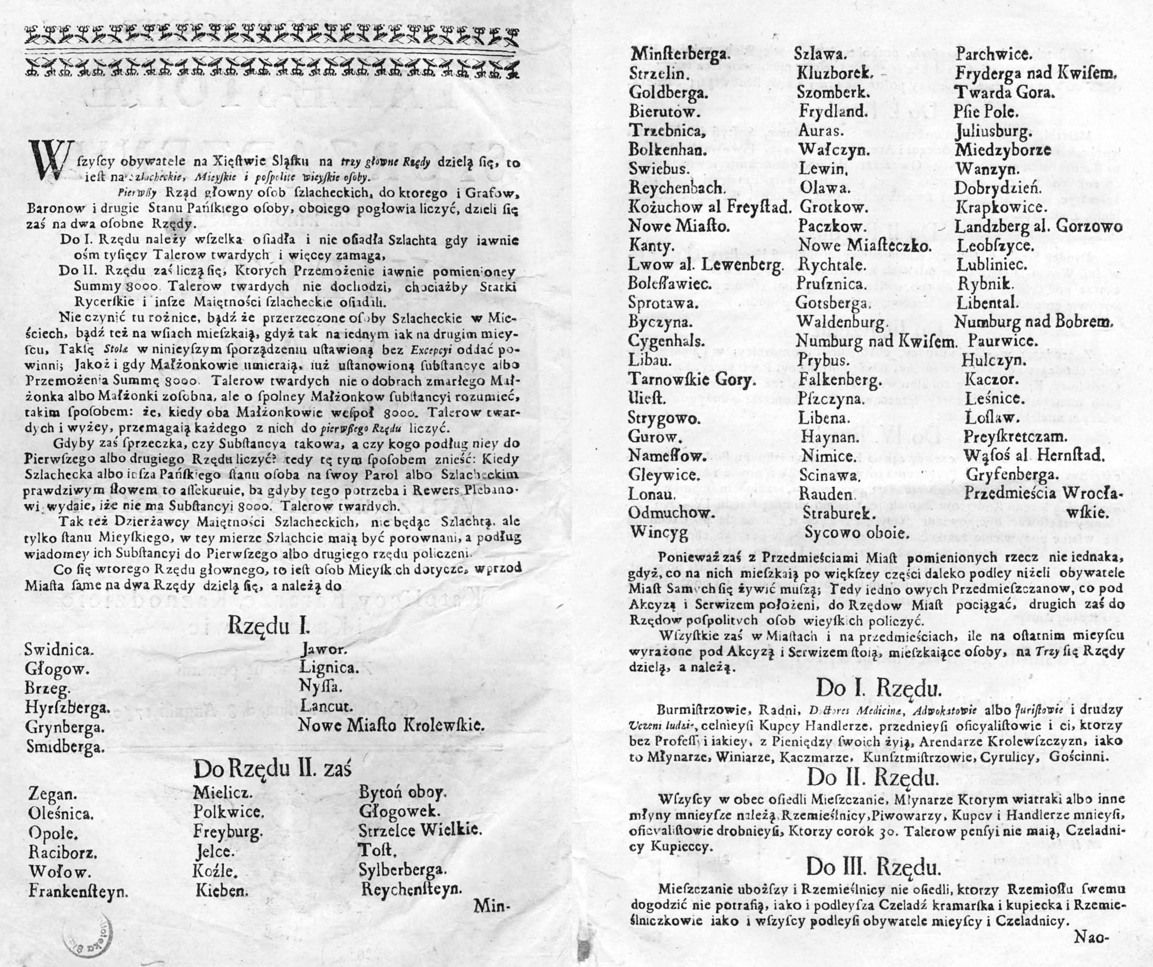 Wznowione powszechne taxae-stolae sporządzenie, Dla samowładnego Xięstwa Sląska, Podług ktorego tak Auszpurskiey Konfessyi iak Katoliccy Fararze, Kaznodzieie i Kuratusowie Zachowywać się powinni. Sub Dato z Berlina, d. 8. Augusti 1750